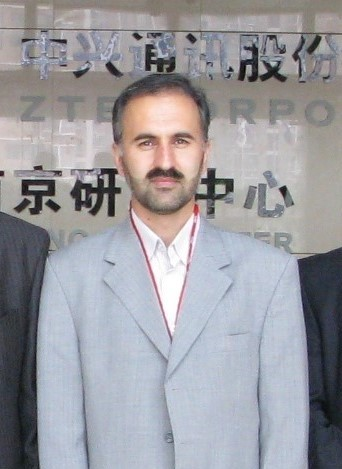 دکتر محمدرضا سجادیان